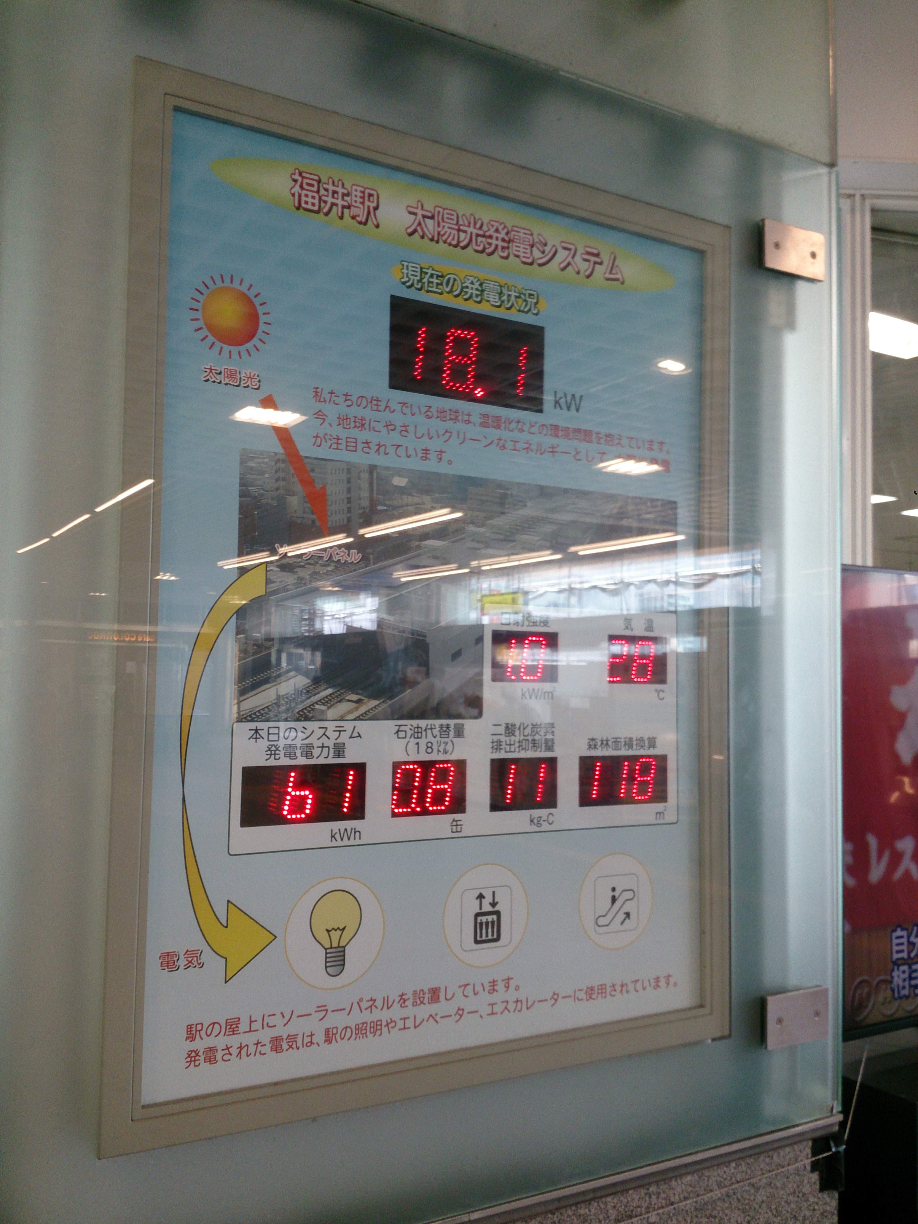 福井駅コンコース設置の発電パネル